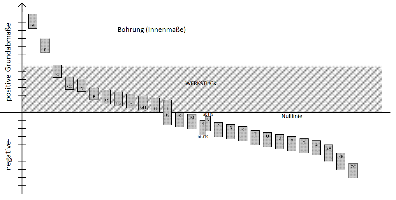 Toleranzfeld fuer Bohrung nach ISO